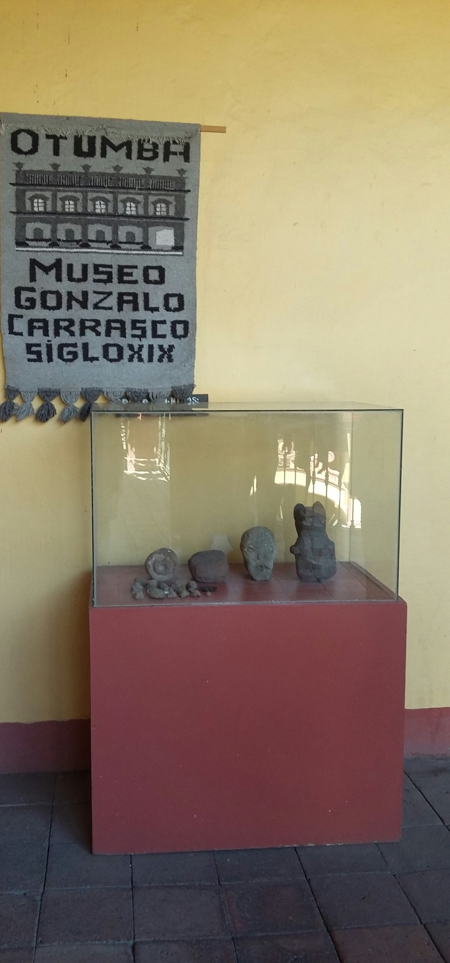 Pancarta de bienvenida